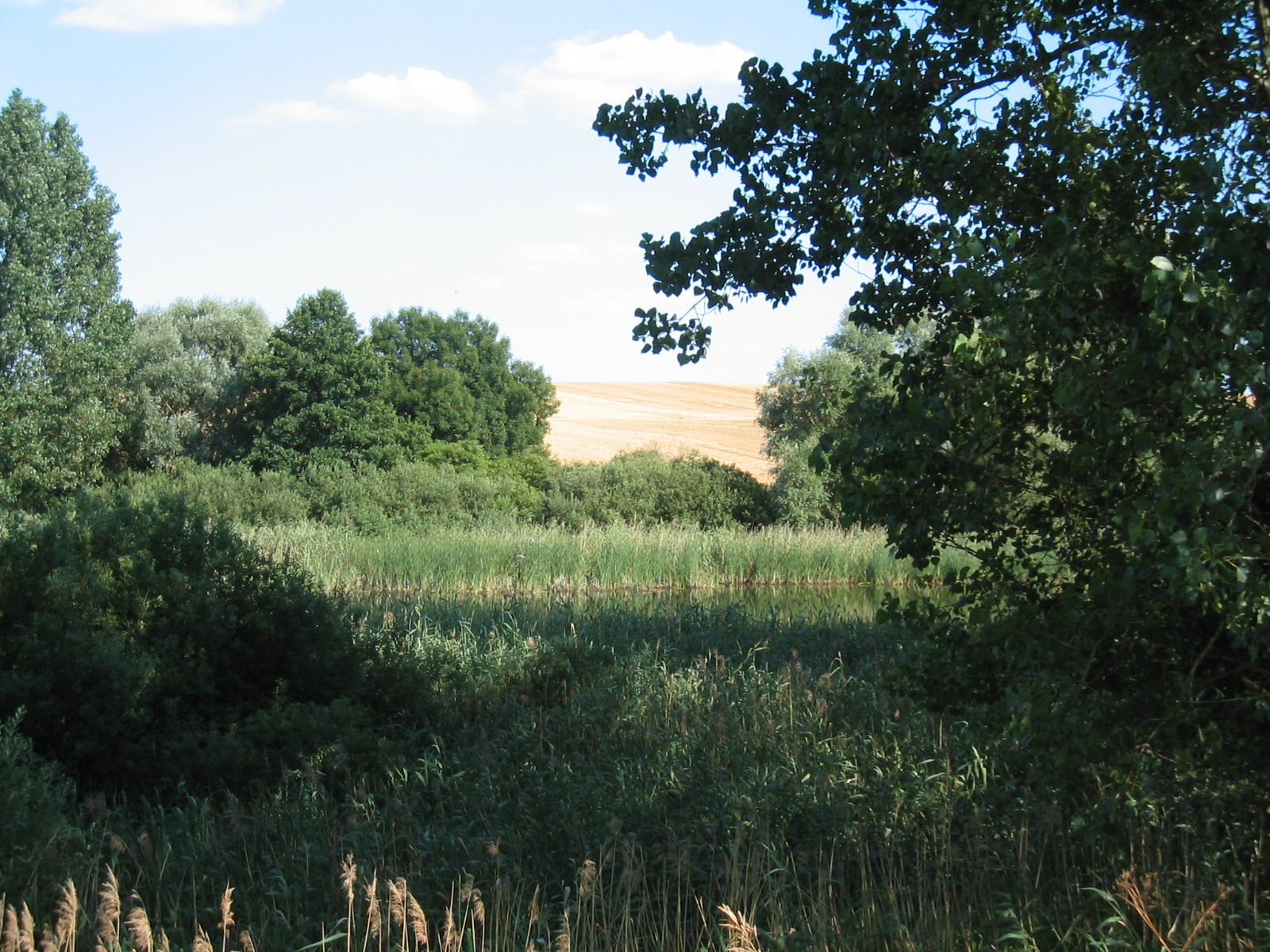 Der Große Burgsee in Blankenburg oder einfach nur Burgsee.